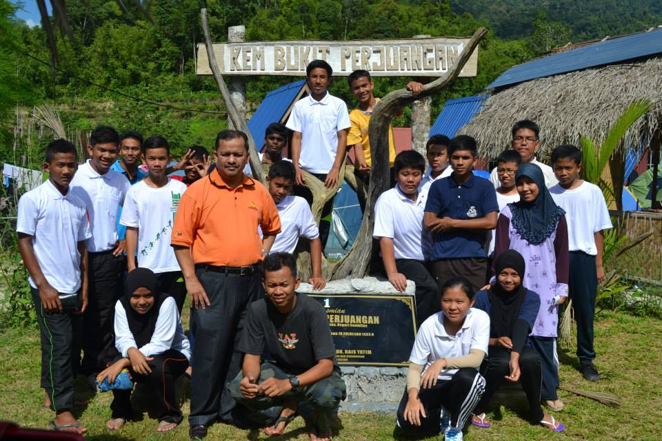 Pasukan Kadet Polis SMKUJ 2014 Semasa Perkhemahan